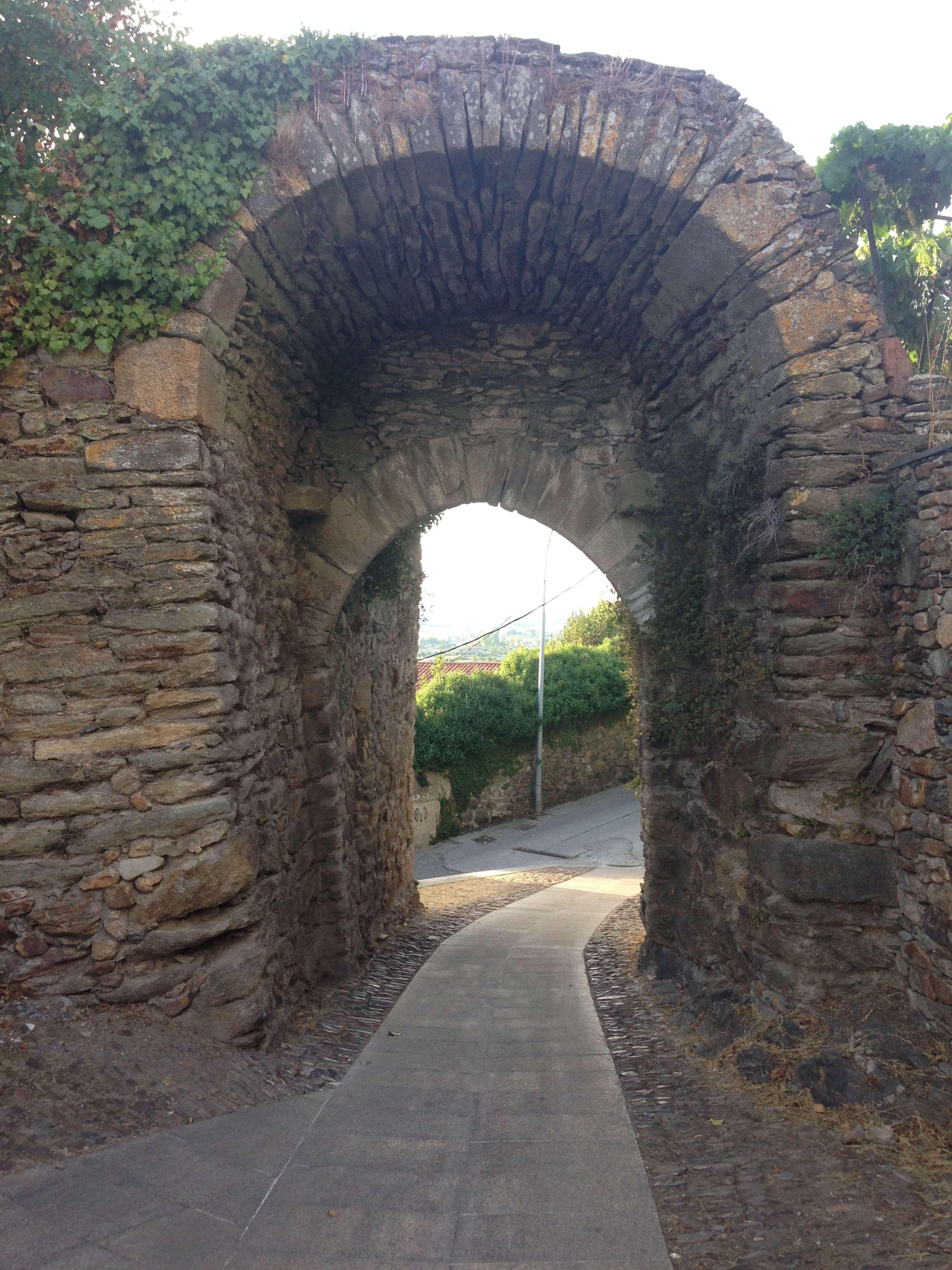 Porta da Alcazaba ou da Peixaría dende o interior do recinto amurallado (Monforte de Lemos).